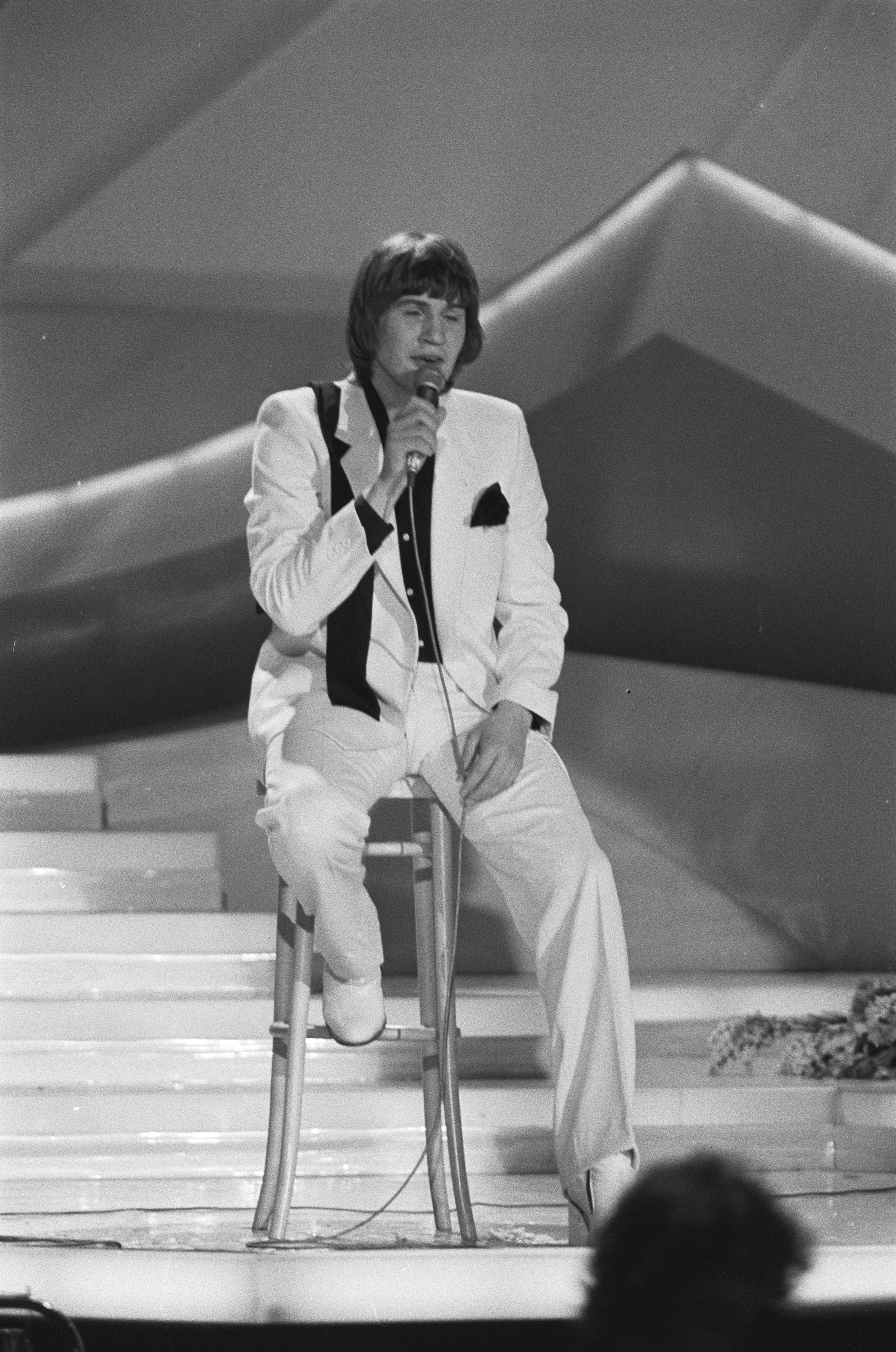 Collectie / Archief : Fotocollectie Anefo Reportage / Serie : [ onbekend ] Beschrijving : Eurovisie Songfestival 1980 ( Den Haag ); winnaar Johnny Logan in aktie Datum : 19 april 1980 Locatie : Den Haag, Zuid-Holland Trefwoorden : Winnaars, songfestivals Persoonsnaam : Johnny Logan Fotograaf : Dijk, Hans van / Anefo Auteursrechthebbende : Nationaal Archief Materiaalsoort : Negatief (zwart/wit) Nummer archiefinventaris : bekijk toegang 2.24.01.05 Bestanddeelnummer : 930-7803